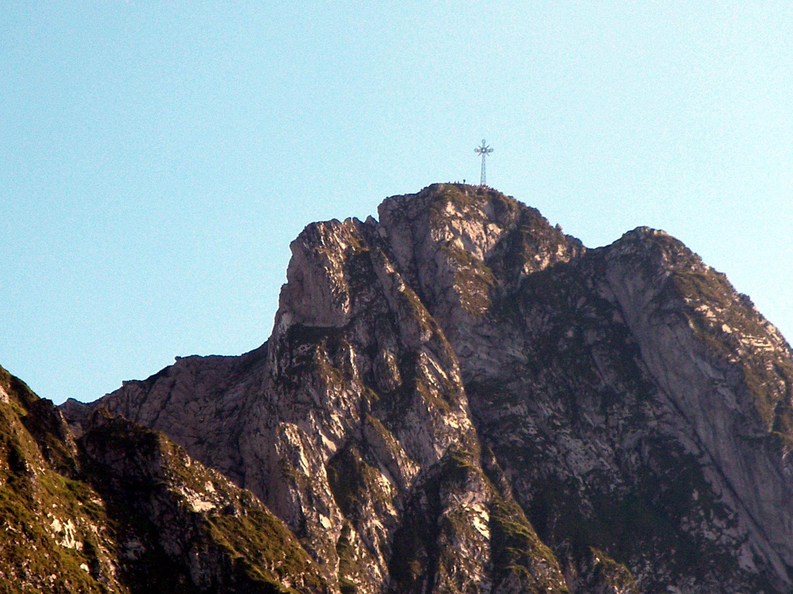 Giewont